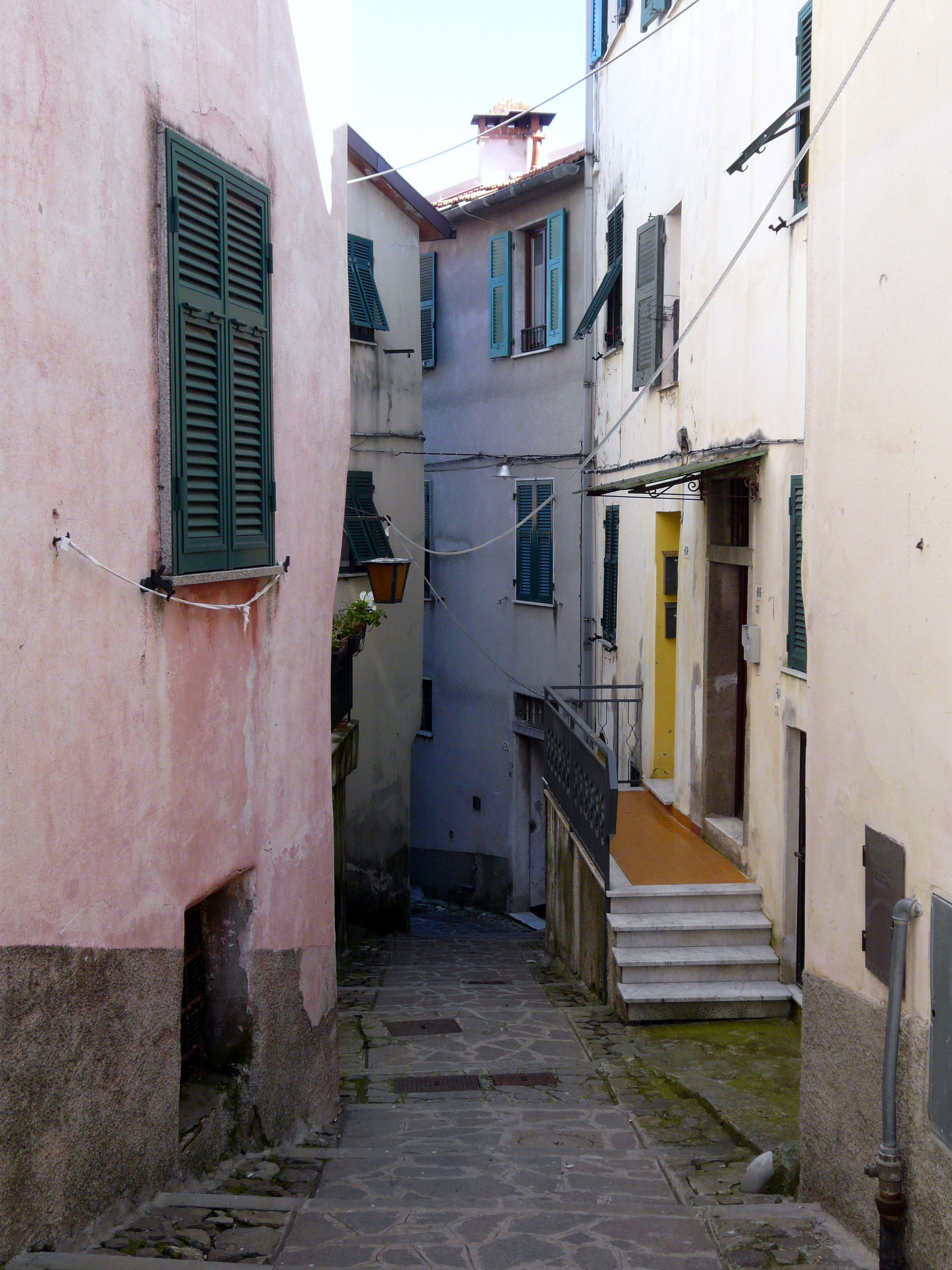 Centro storico di Valeriano, Vezzano Ligure, Liguria, Italia